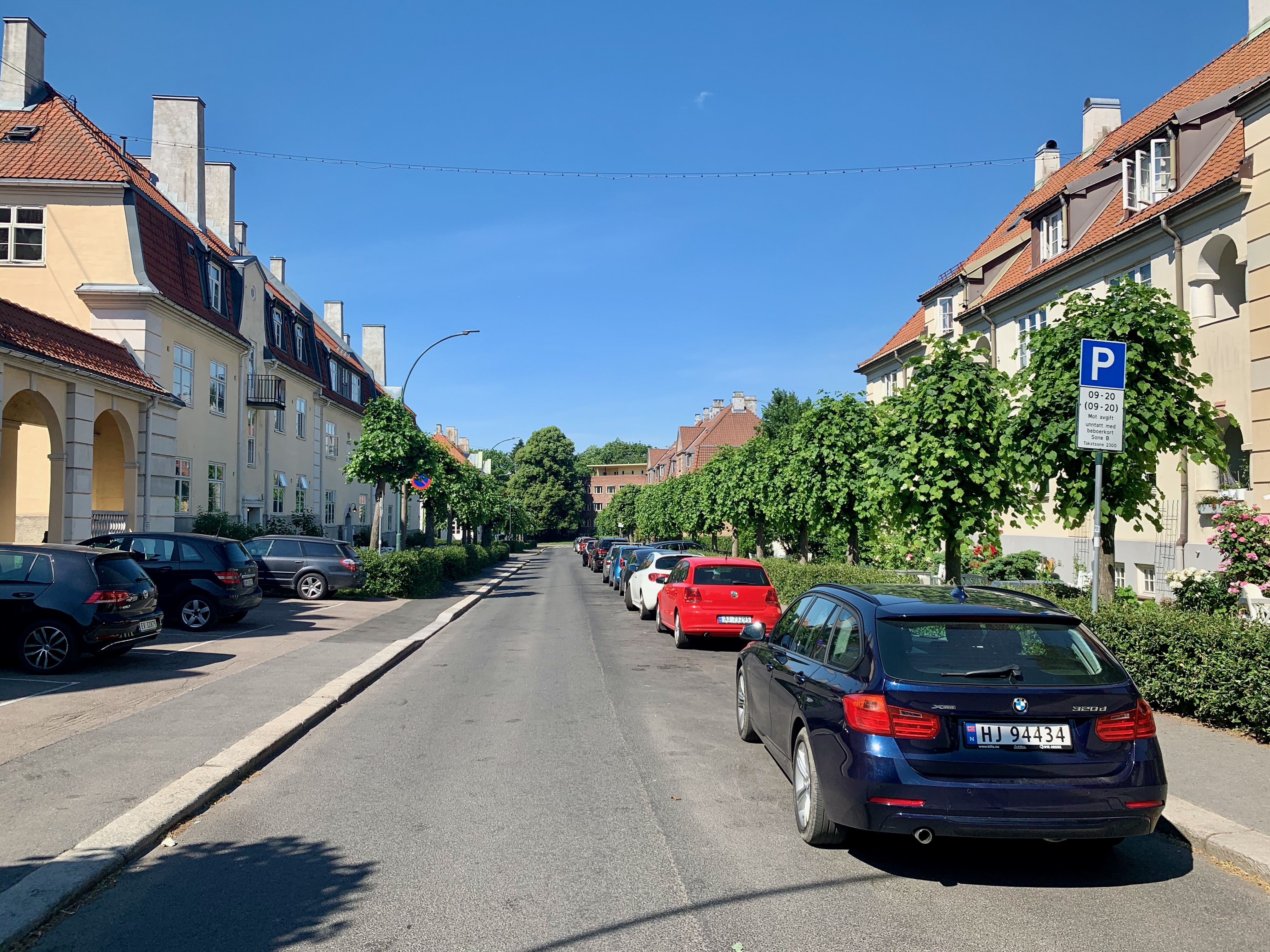 Linderngata i Oslo.